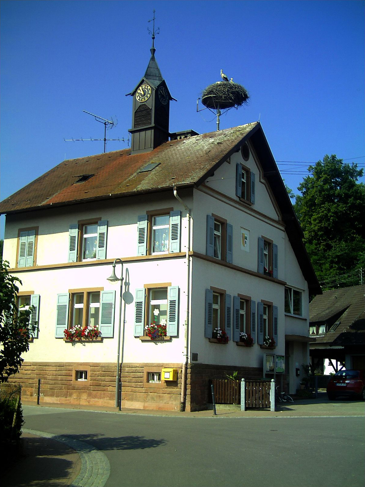 Storchennest auf dem Alten Schulhaus von 1881, seit 1970 als Kindergarten genutzt